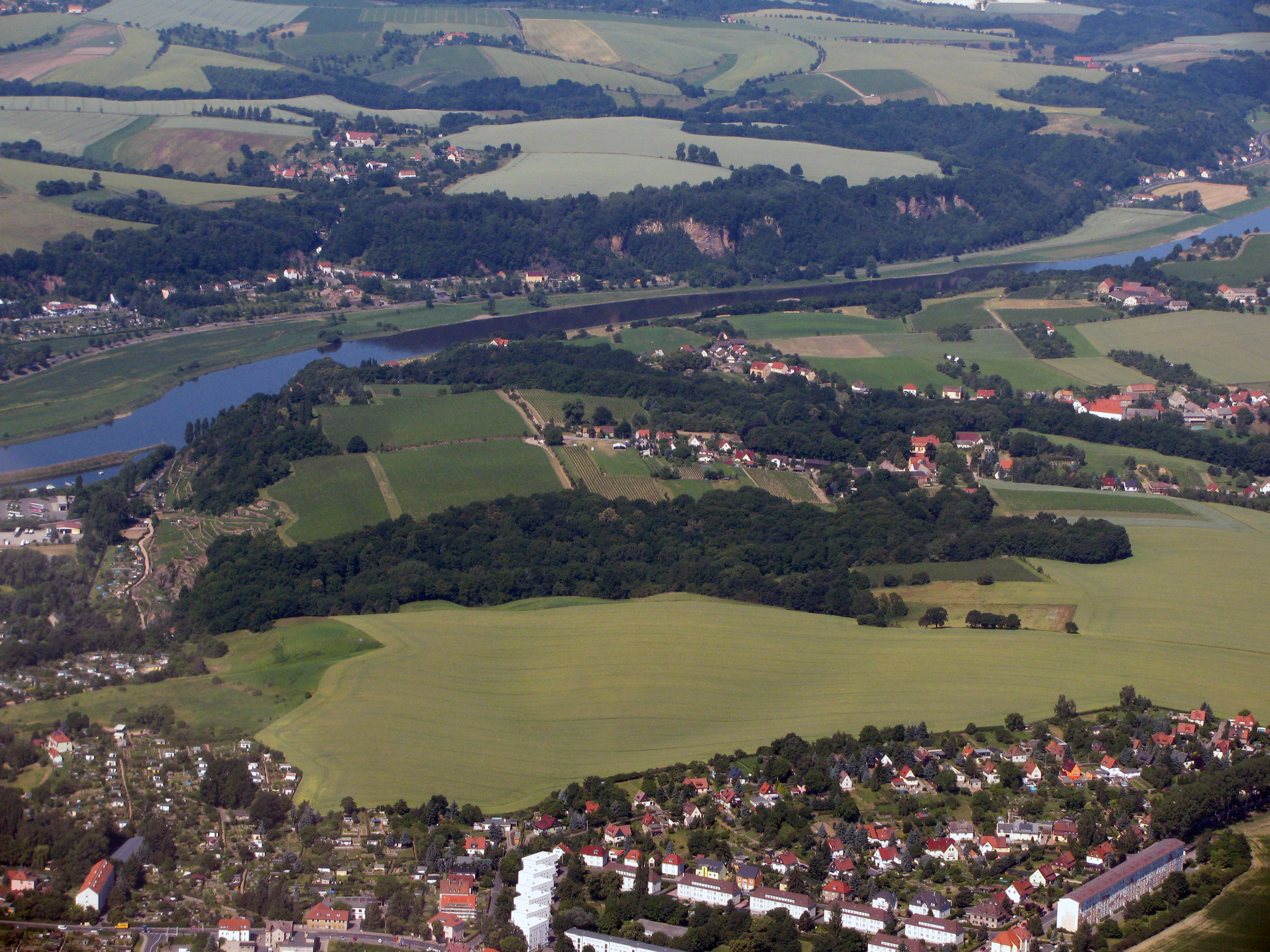 Luftbild Meißen-Proschwitz, Winkwitz